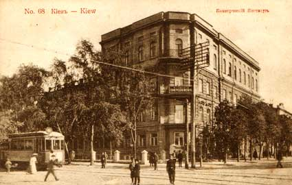 Киевский Коммерческий Институт. Открытка конца XIX–начала XX века.